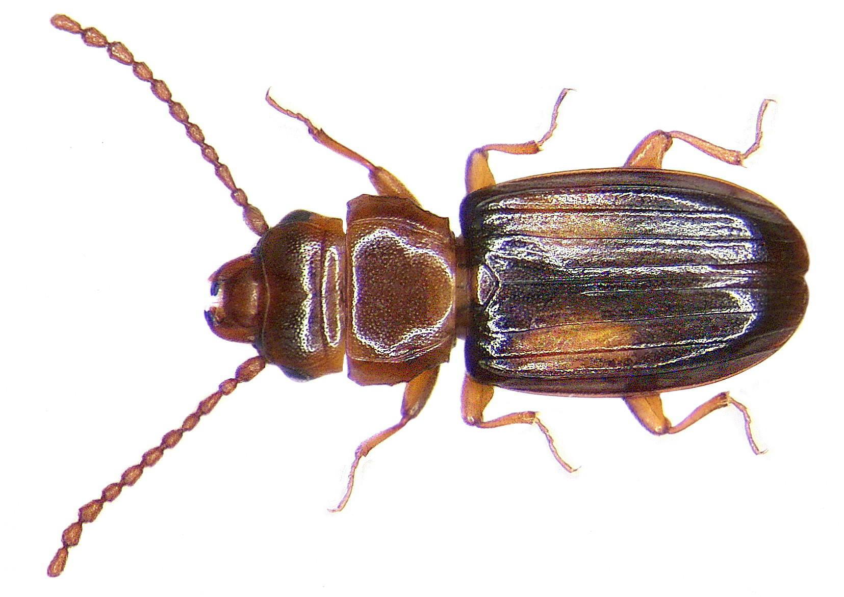 Laemophloeus monilis (Fabricius, 1787) Familie: Laemophloeidae Grösse: 2,5-4,5 mm Verbreitung: Europa Ökologie: unter Laubholzrinde Fundort: Germania, Thüringen, Schleiz, Burgk leg.det. A.Weigel, 2004 Foto: U.Schmidt, 2006